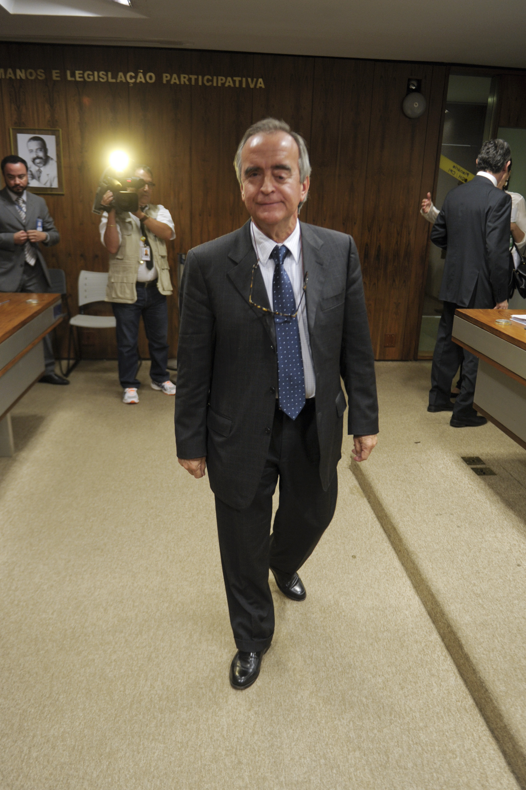 Depoimento do ex-diretor da Área Internacional da Petrobras, Nestor Cerveró. O depoente deixa a sala após o término da CPMI. Foto: Jefferson Rudy/Agência Senado